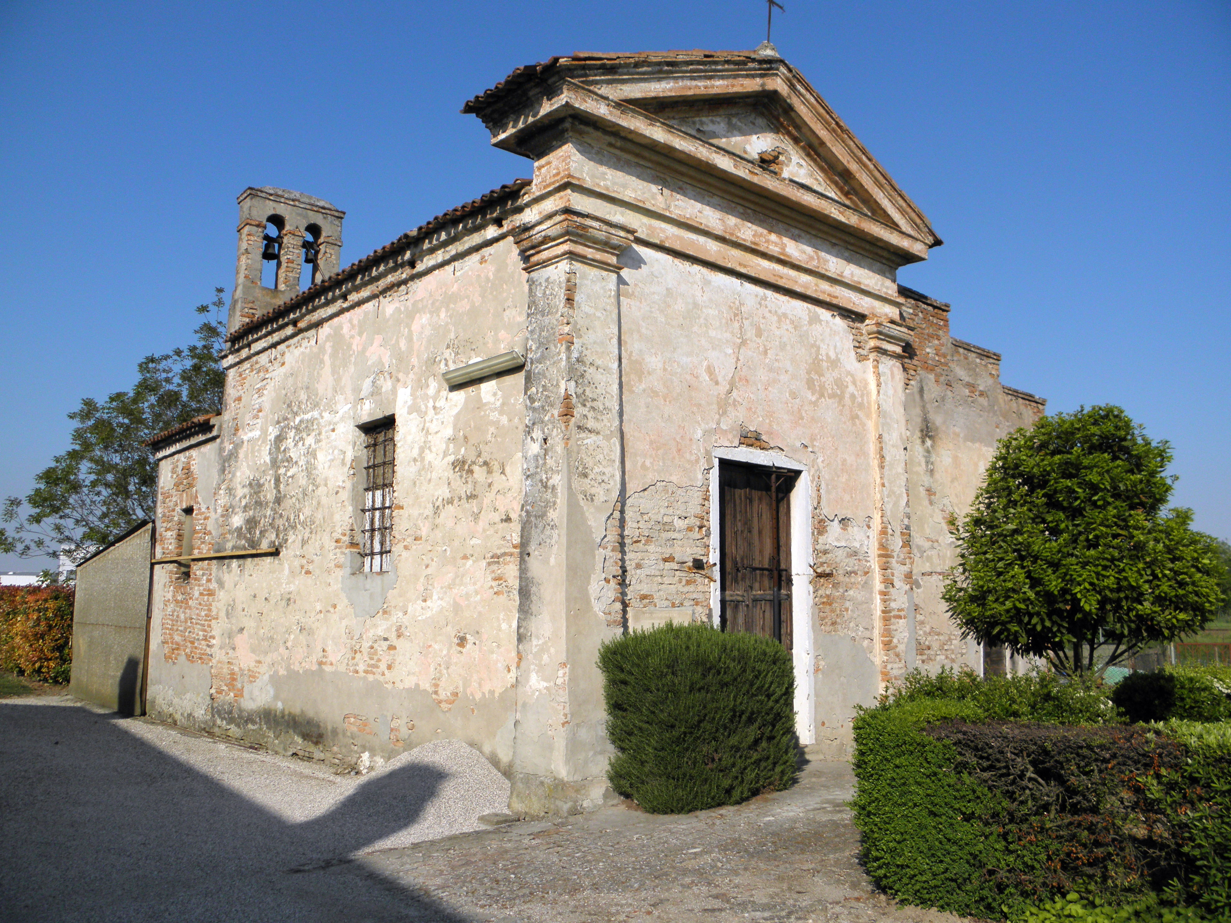 Borsea: l'oratorio di Santa Libera ai Gorghi sito in Via Girolamo Savonarola verso località Passo di Pontecchio.